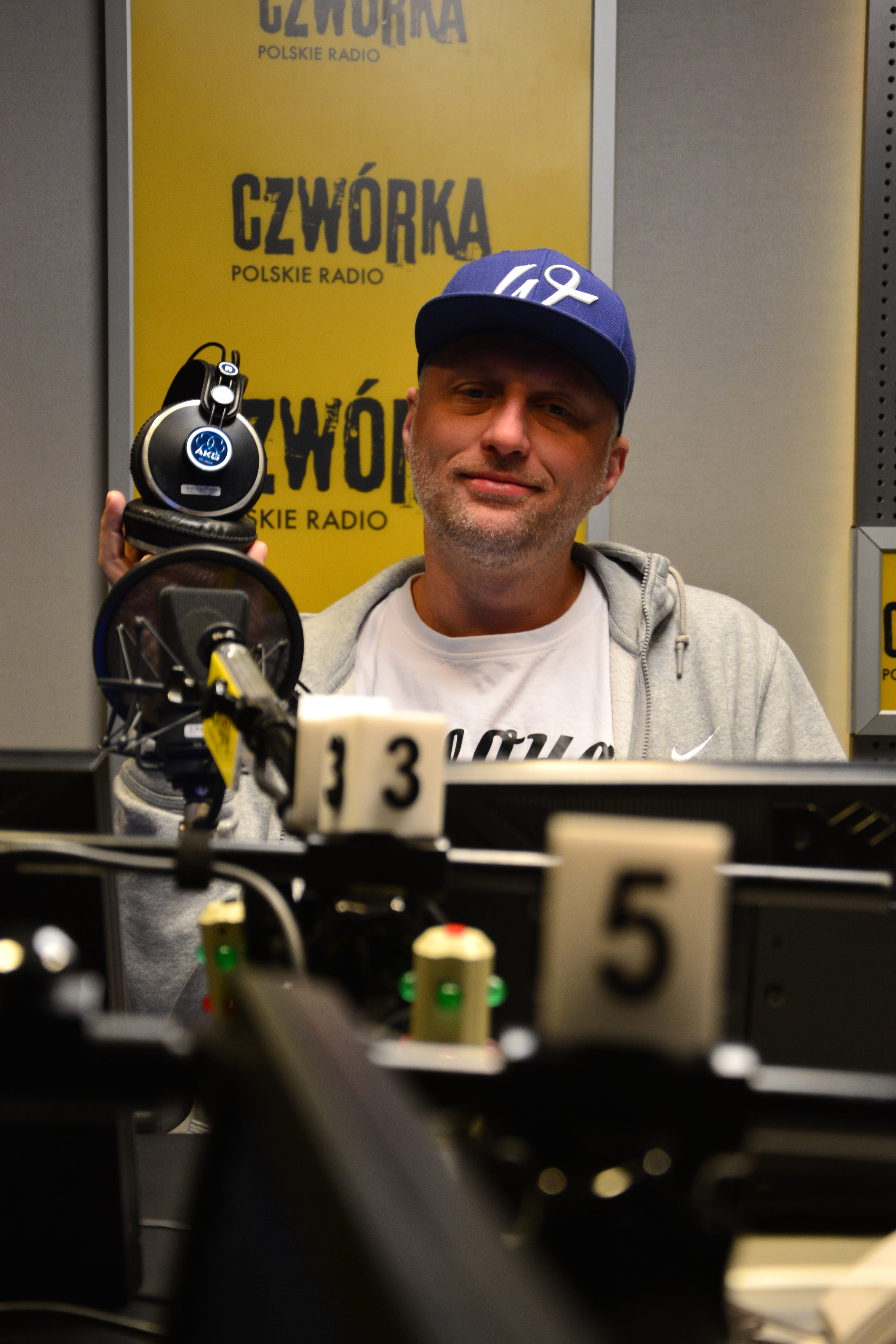 Numer Raz- dziennikarz Czwórki Polskiego Radia.